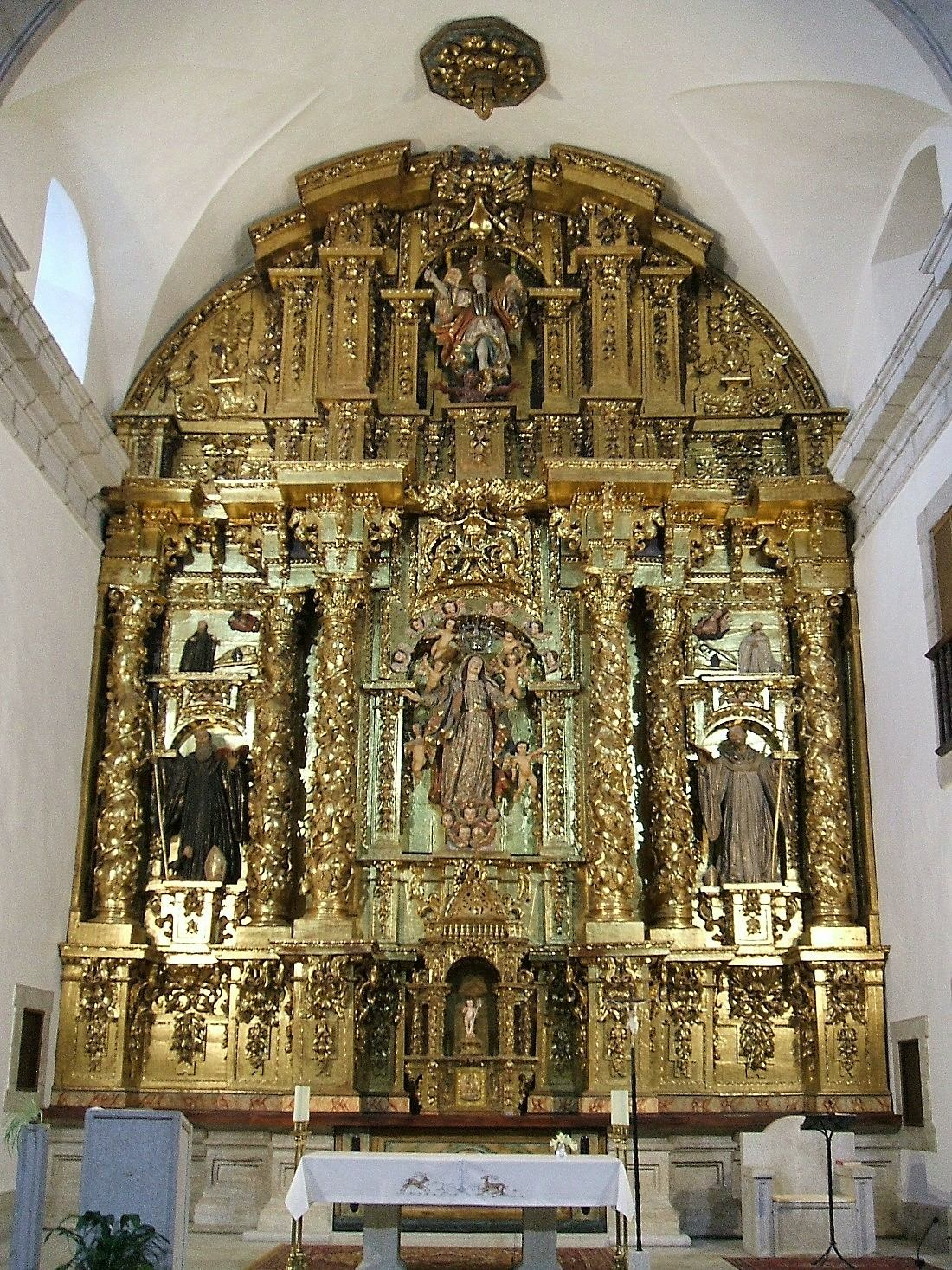 Retablo mayor barroco de la iglesia del Monasterio de MM Cistercienses de San Miguel de las Dueñas, provincia de León, España